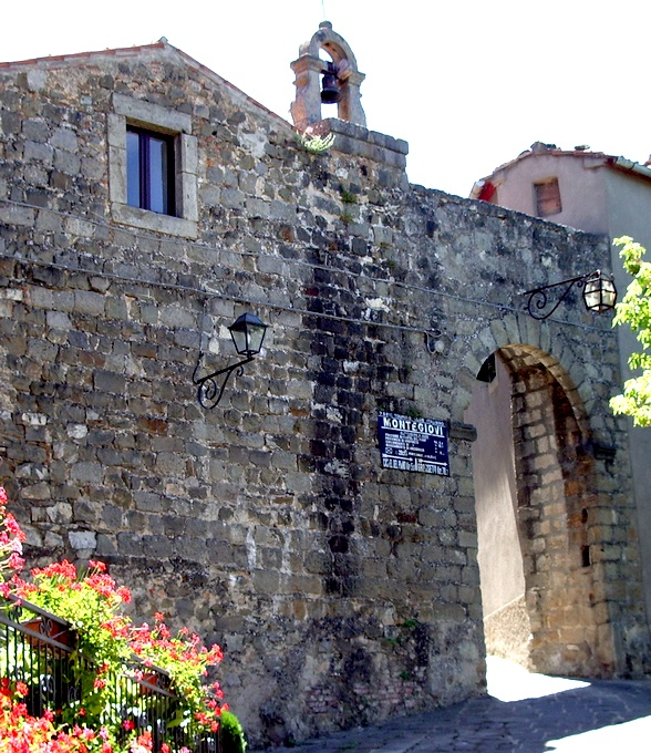 Porta di accesso a Montegiovi (GR), Tuscany (Italy)